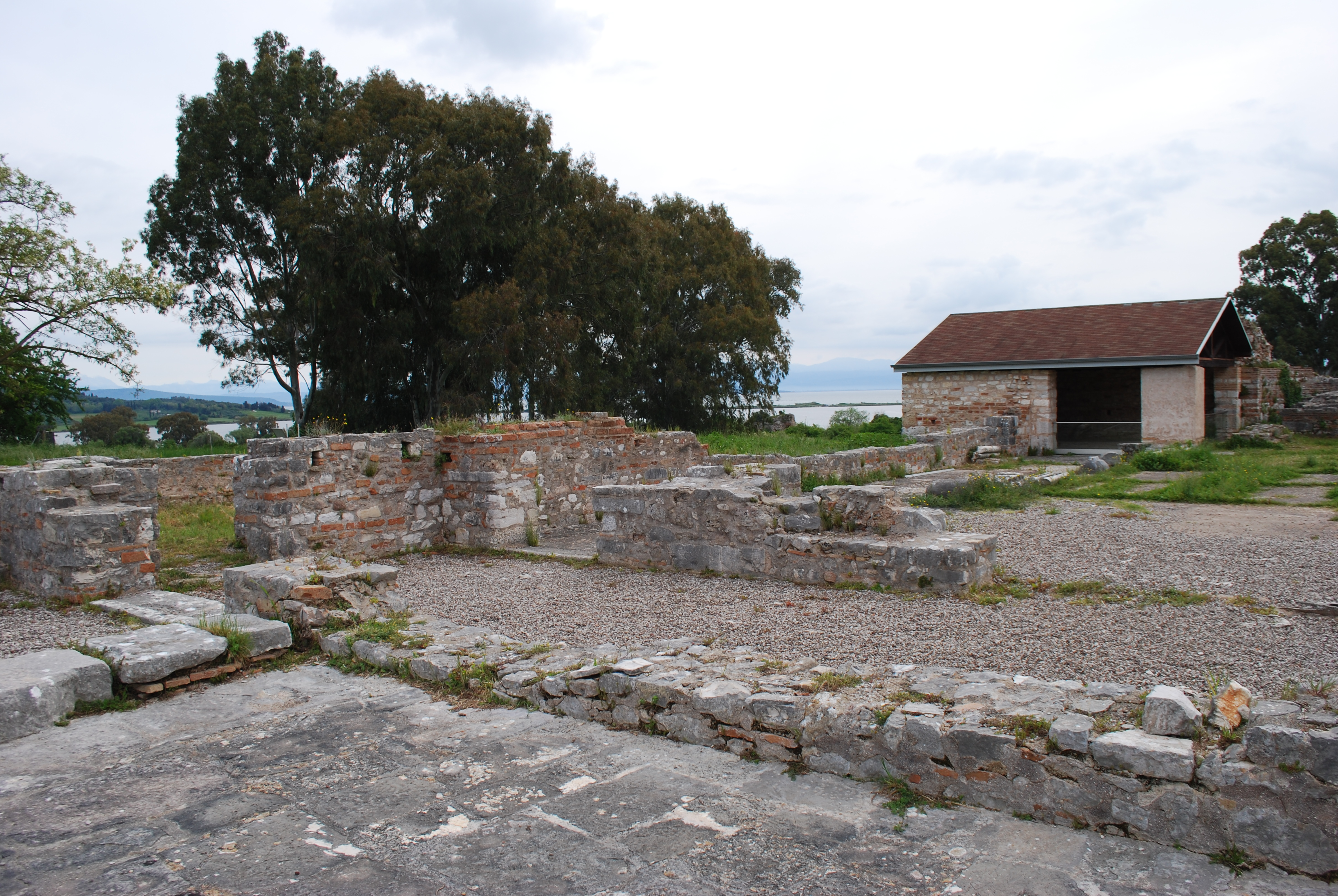 Vue de Nicopolis en Epire.